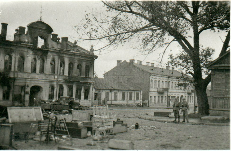 Беларуская (тарашкевіца): Менск (Miensk), Раманаўская Слабада (Ramanaŭskaja Słabada), шлях Каралеўскі (šlach Karaleŭski). Жаночая жыдоўская вучэльня